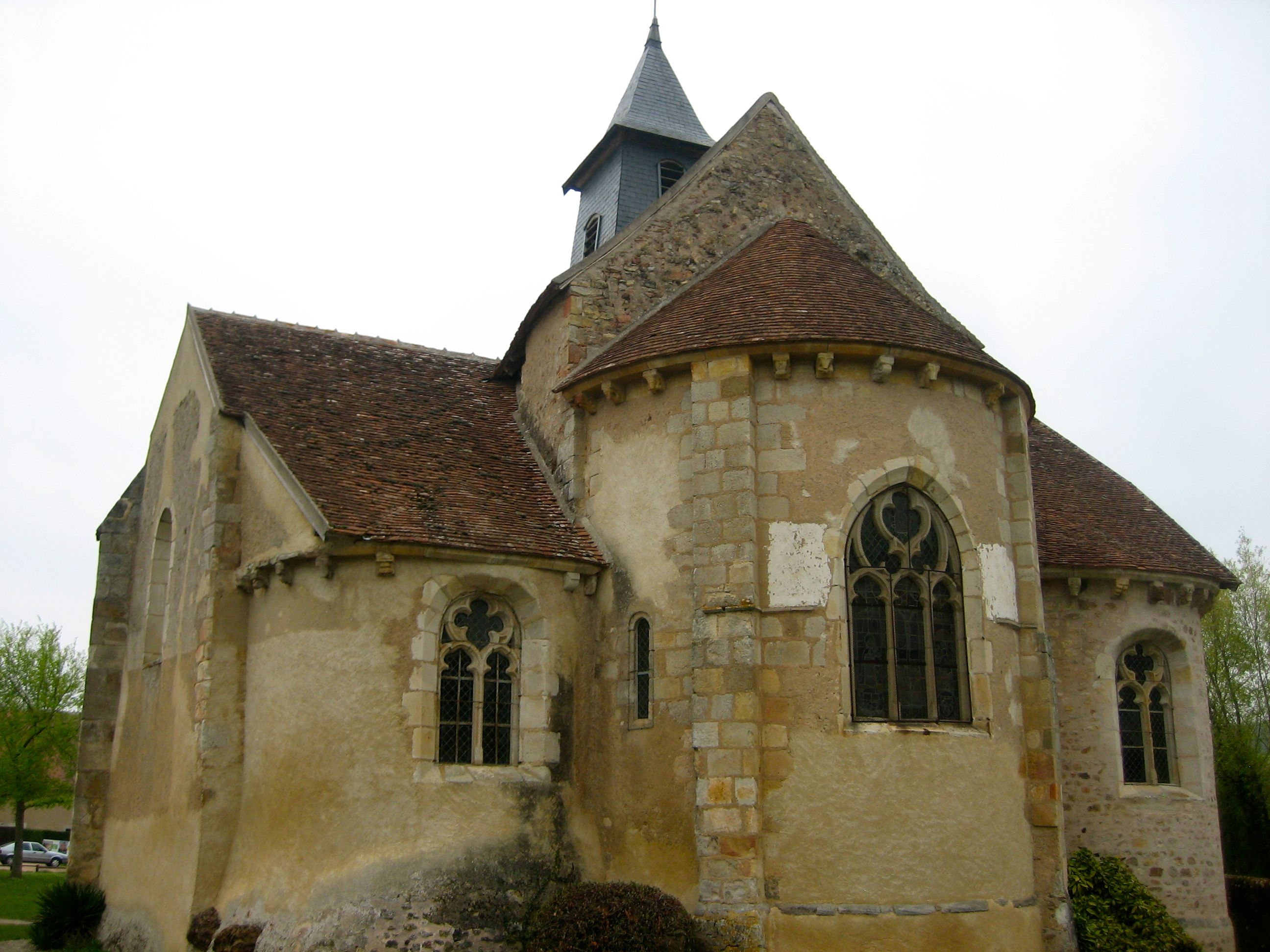 Chevet de l'église Saint-Georges à Saint-Jeanvrin